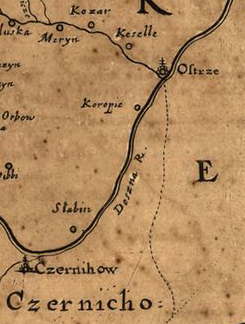 фрагмент мапи Боплана де зображене с.Короп'є